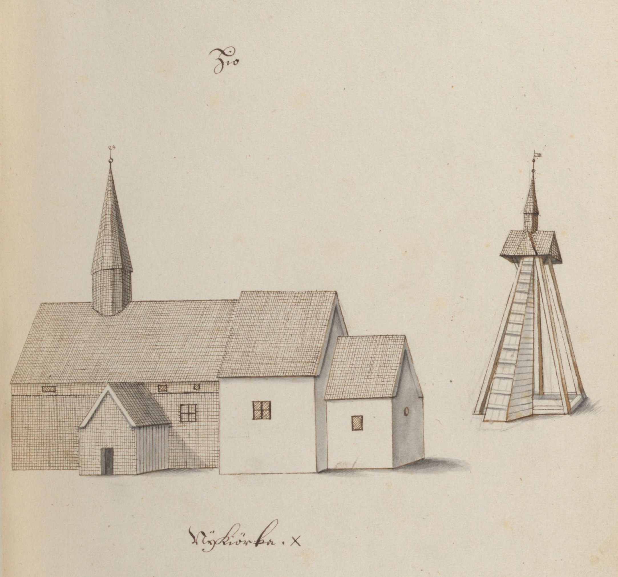 Hjo kyrka. Kyrka, äldre, teckning ur Peringskiölds Monumenta, avfotograferad i färg.